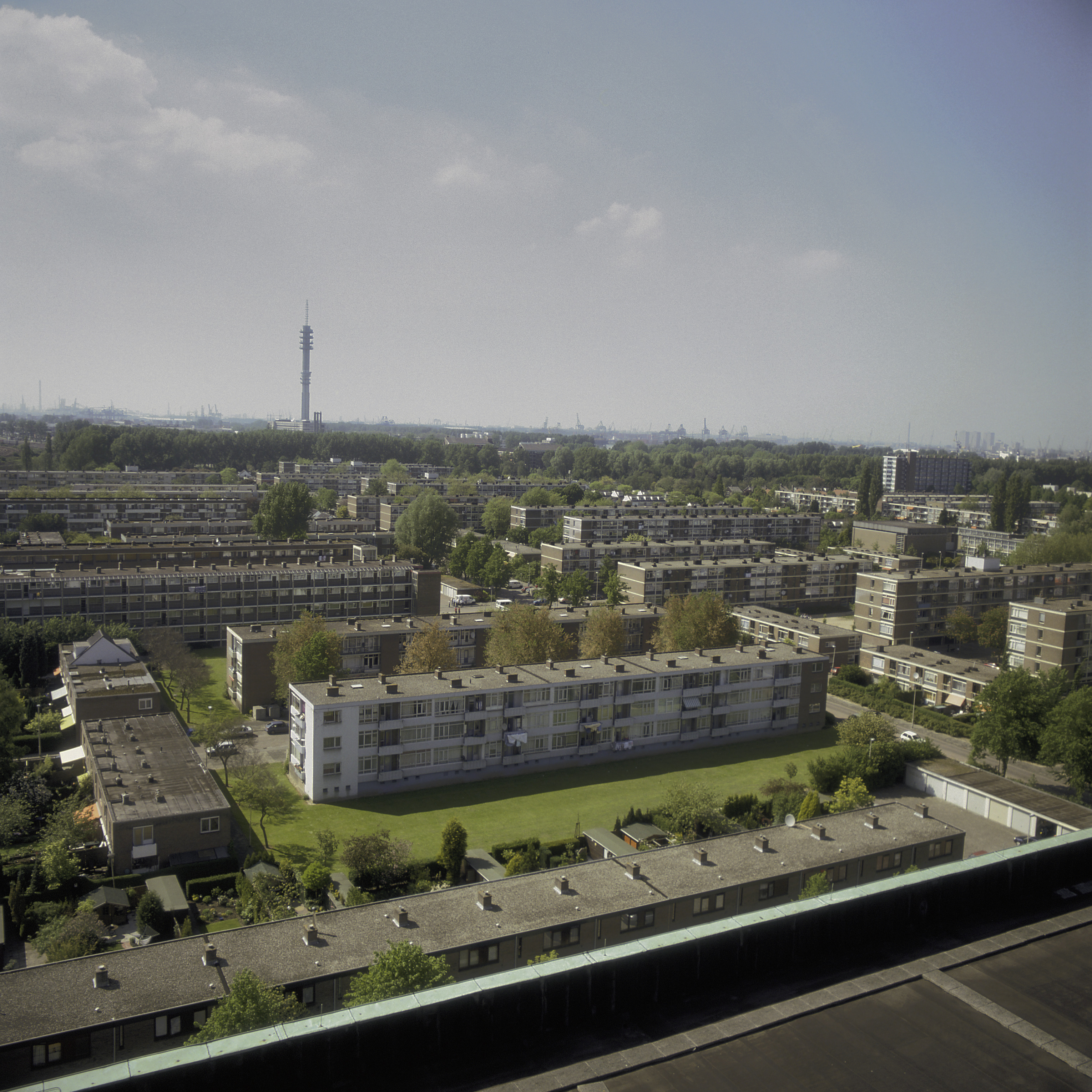 Woonwijk: Pendrecht: Overzicht naar het westen, gezien vanaf flat Burghsluissingel (opmerking: Gefotografeerd voor Toonbeelden van de Wederopbouw)